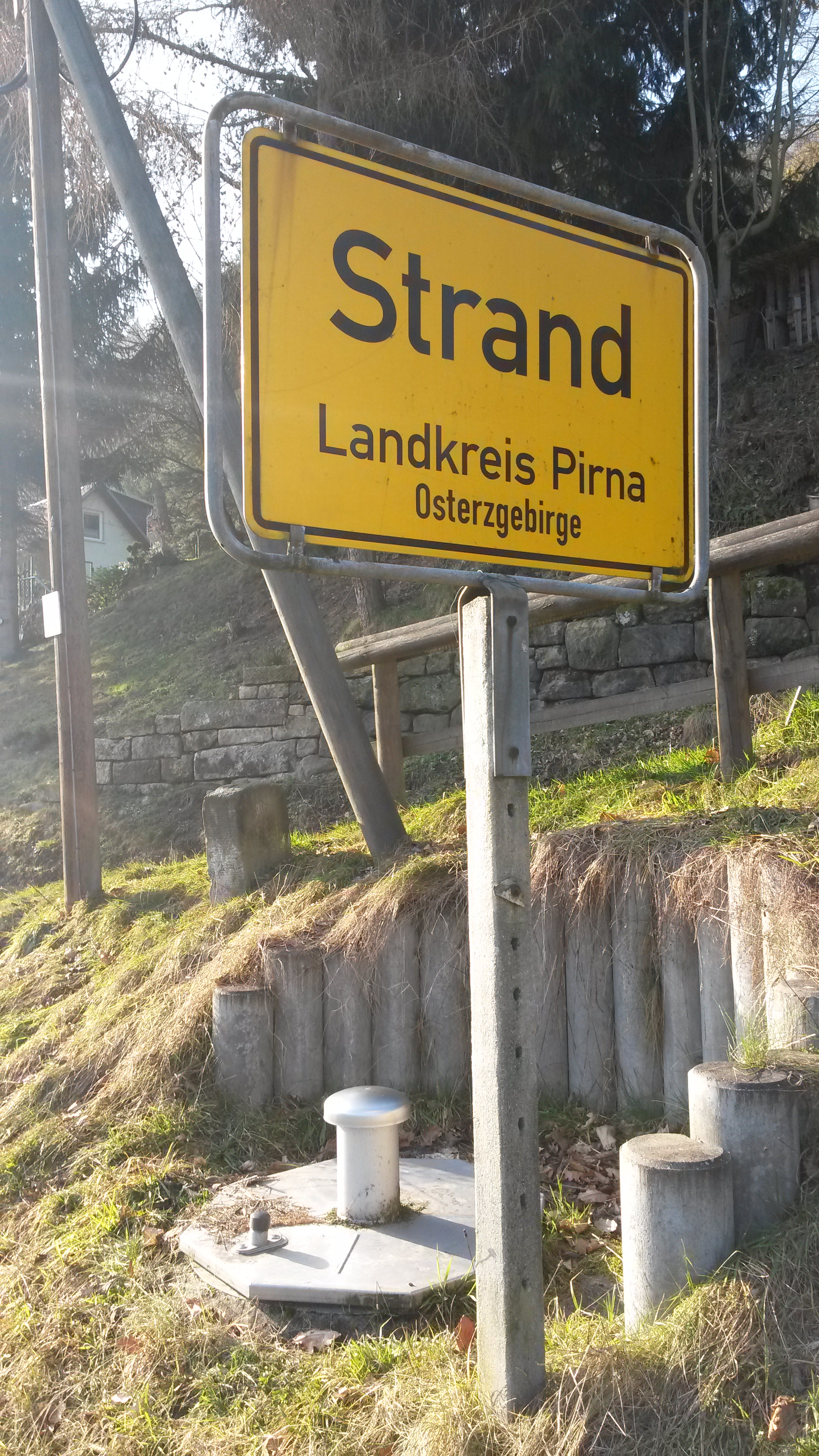 Ortsschild Strand (Gemeinde Struppen)